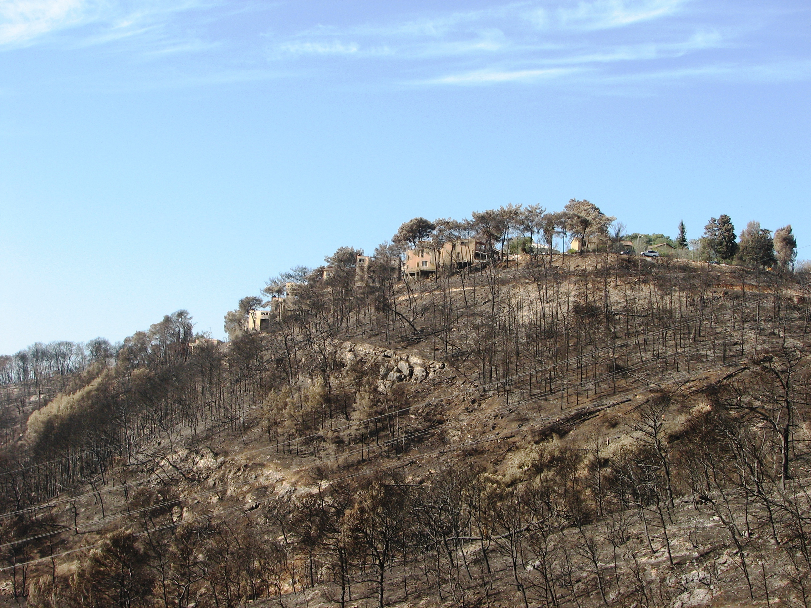 Beit Oren is a kibbutz in northern Israel, located on Mount Caramel. Israel. pictures after 2010 fire בית אורן הוא קיבוץ במרכז רכס הכרמל, בתחום המועצה האזורית חוף הכרמל. תמונות לאתר השריפה של דצמבר 2010 מבט מכוון דרום